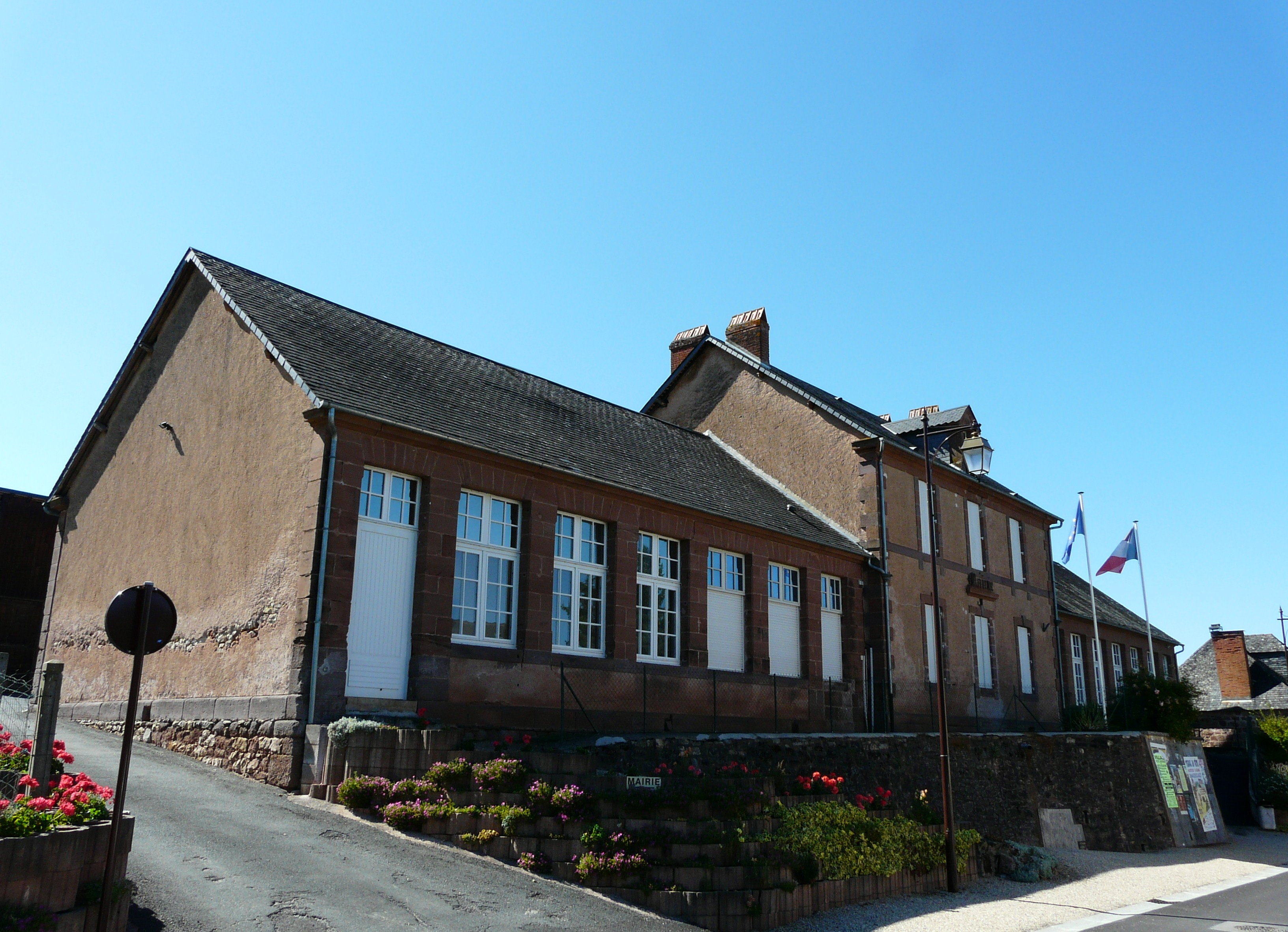 La mairie de Villac, Dordogne, France.